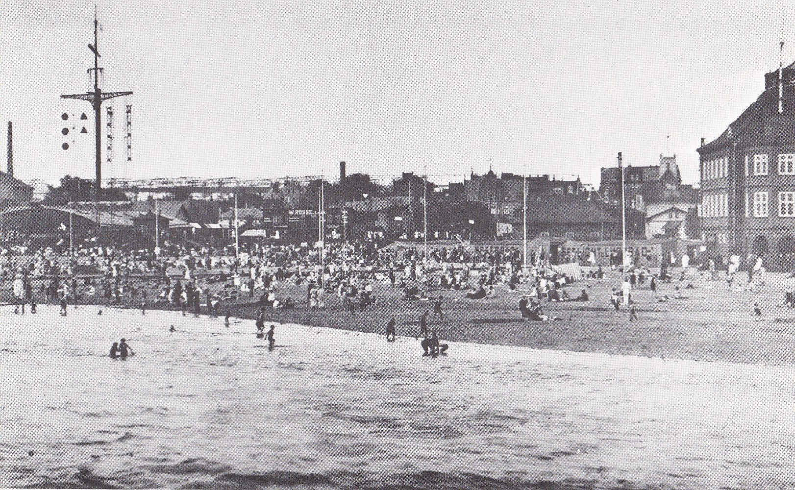 Das Weserbad an der Geestemündung in Bremerhaven; links der Wasserstandsanzeiger, rechts das Lotsenhaus.